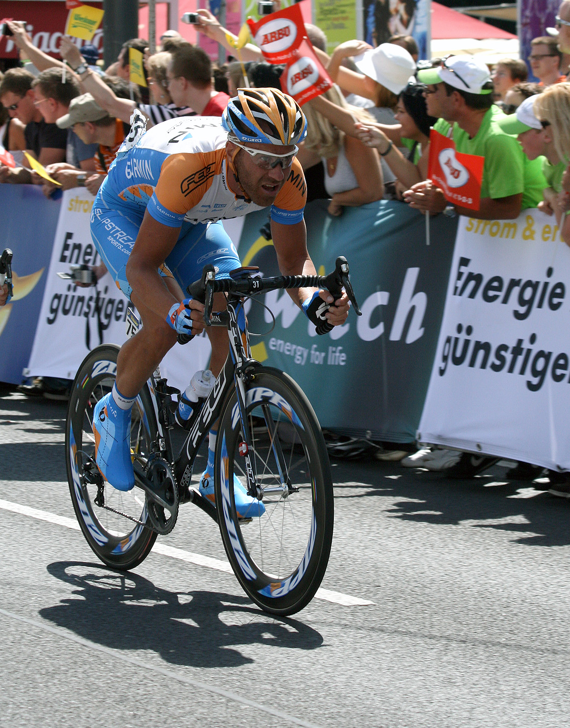 Österreich-Rundfahrt 2009: Svein Tuft auf der letzten Runde der letzten Etappe